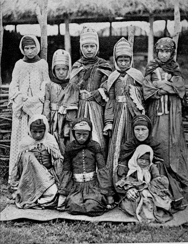 Ногайские девушки в традиционных костюмах.